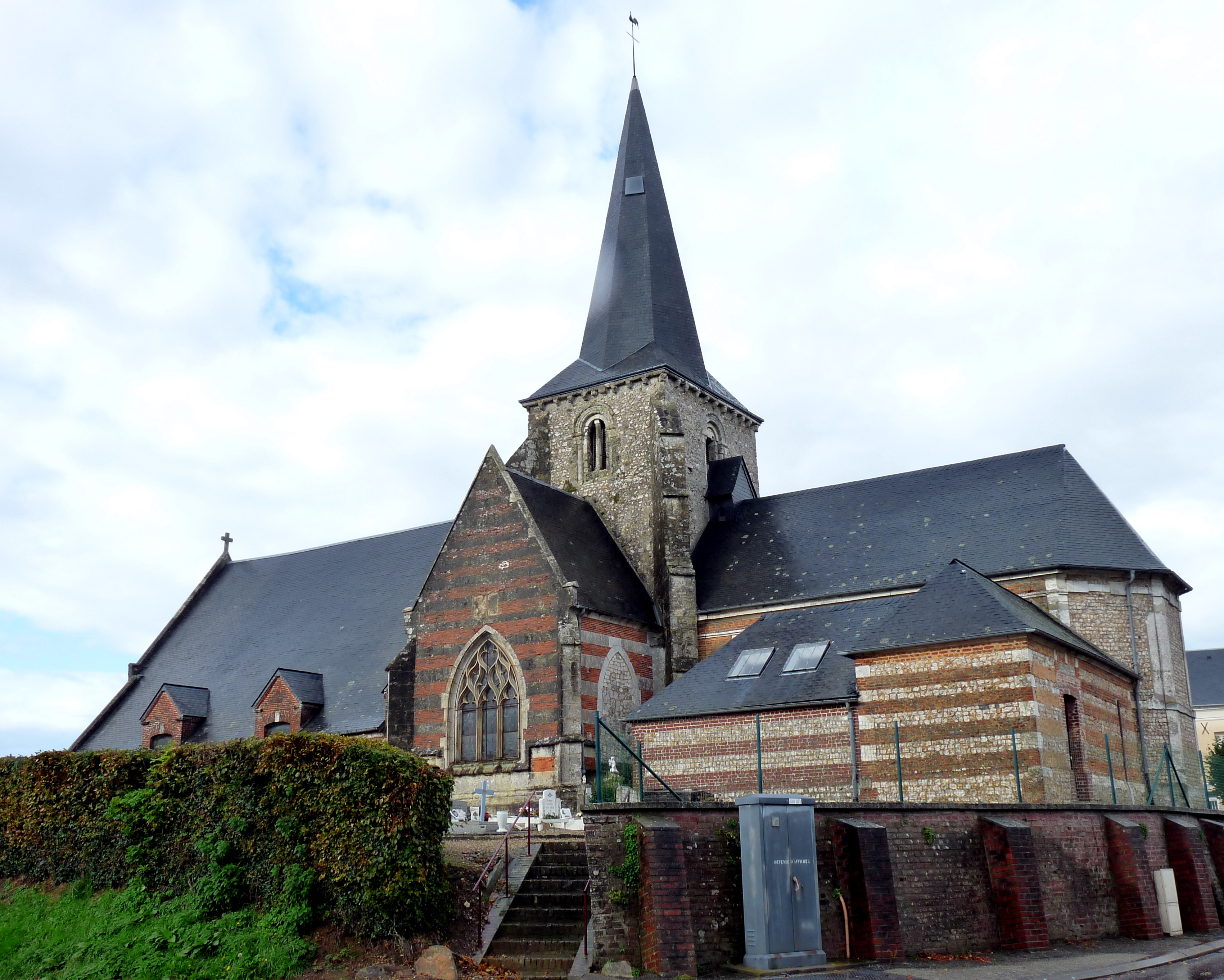 Église Saint-Denis d'Écrainville .